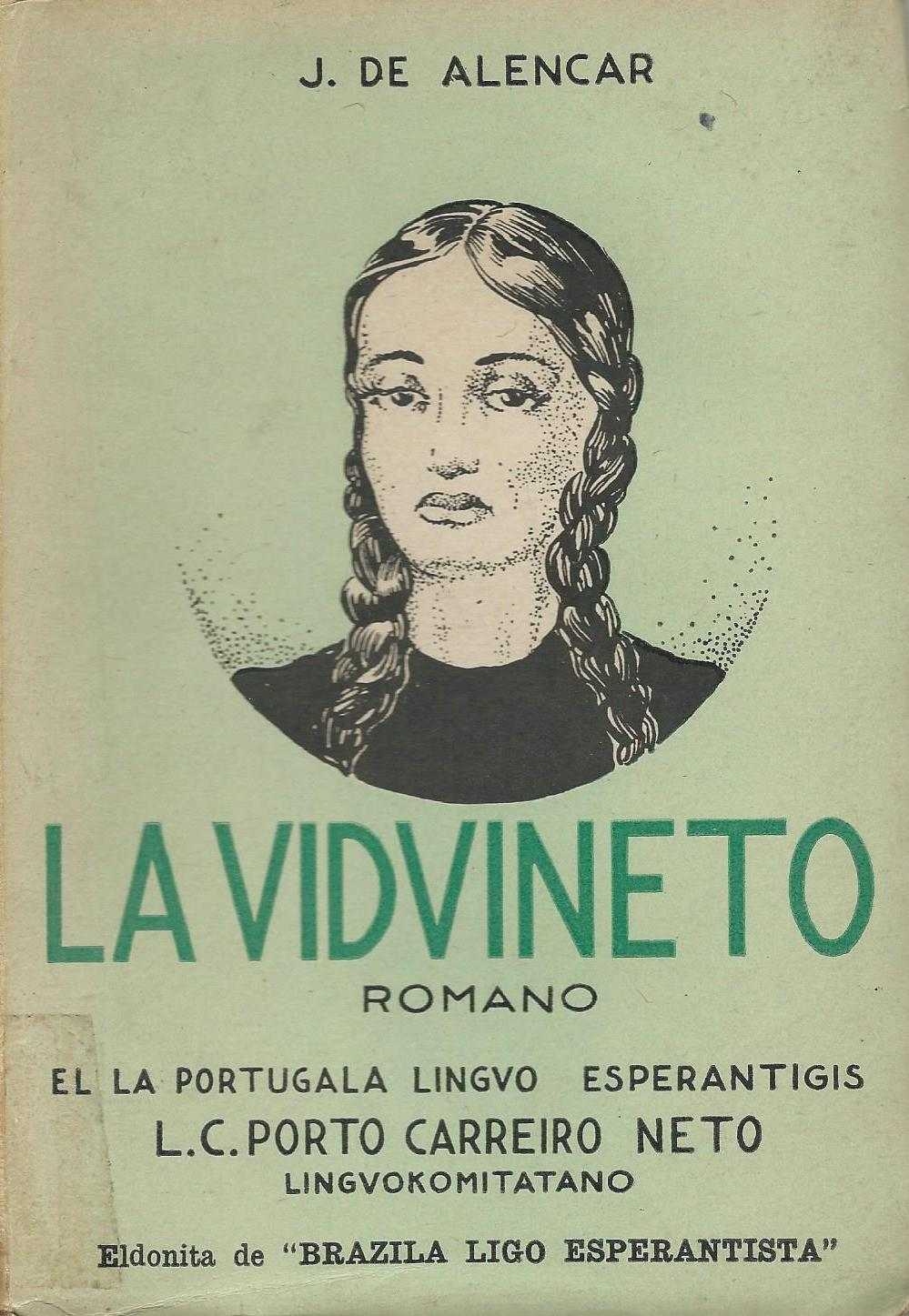 librokovrilo de "La Vidvineto", 1942